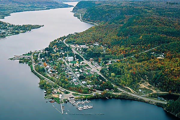 Vue aérienne de Grandes-Piles rivière St-Maurice